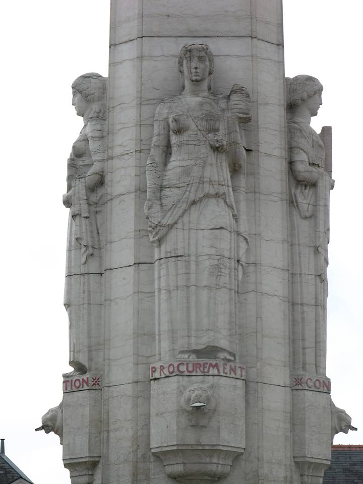 "Le Procurement", une des quatre allégories figurant sur le mémorial